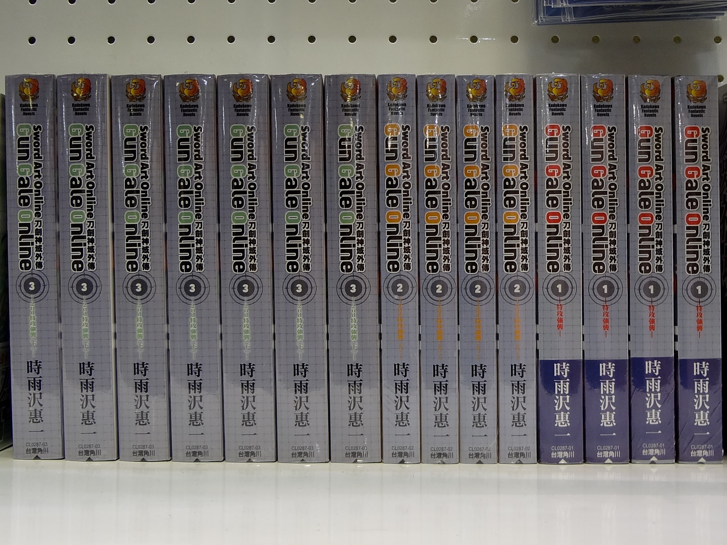 動漫爭艷嘉年華紀念品賣店，台灣角川《刀劍神域外傳Gun Gale Online》輕小說第1至3集。